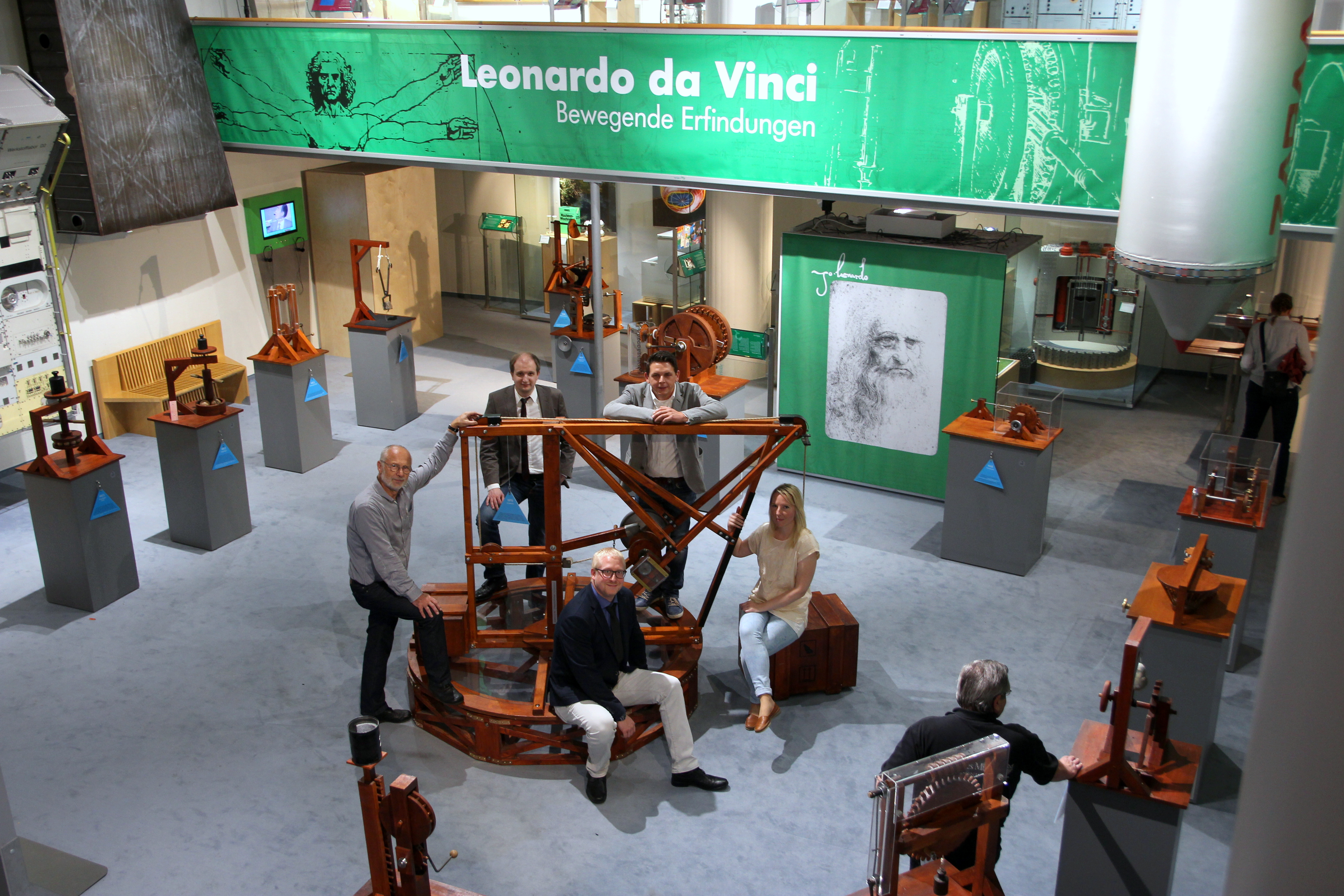 Deutsches Museum Bonn. GLAM. Ausstellung Leonardo da Vinci mit dem Untertitel Bewegende Erfindungen